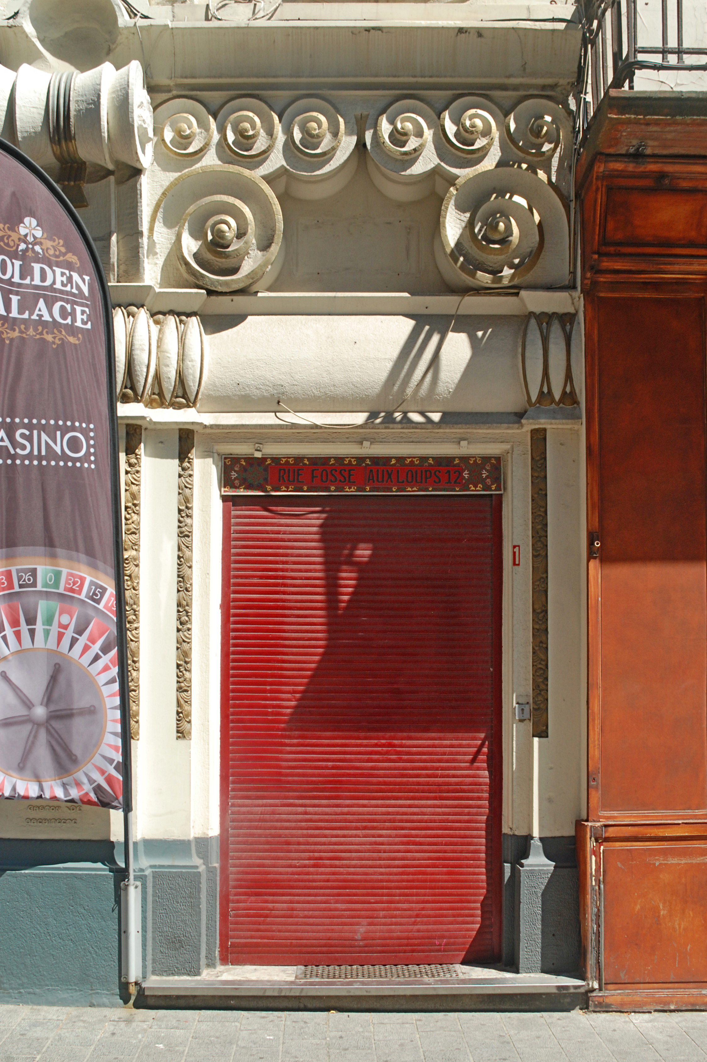 Belgique - Bruxelles - Ancien cinéma Caméo (Art déco, architecte Gaston Ide, 1925)